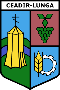 Герб Чадыр-Лунги